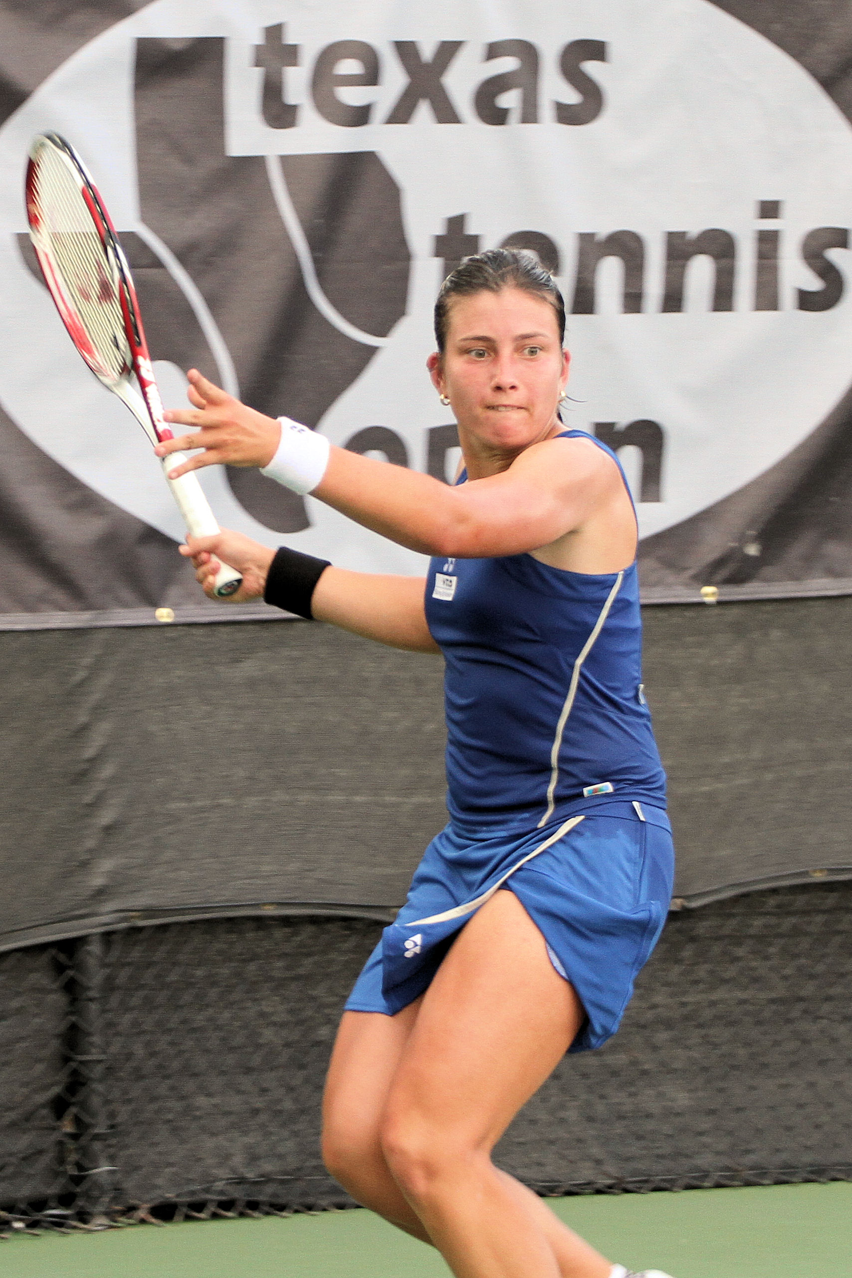 Anastasija Sevastova (LAT) 2011-08-24 Sevastova vs Arvidsson